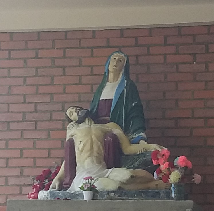 Imagen Original de Nuestra Señora de las Misericordias que se venera en el cerro de Bolívar-Cauca.